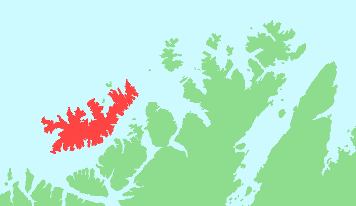 Locator map of Sørøya, Finnmark, Norway